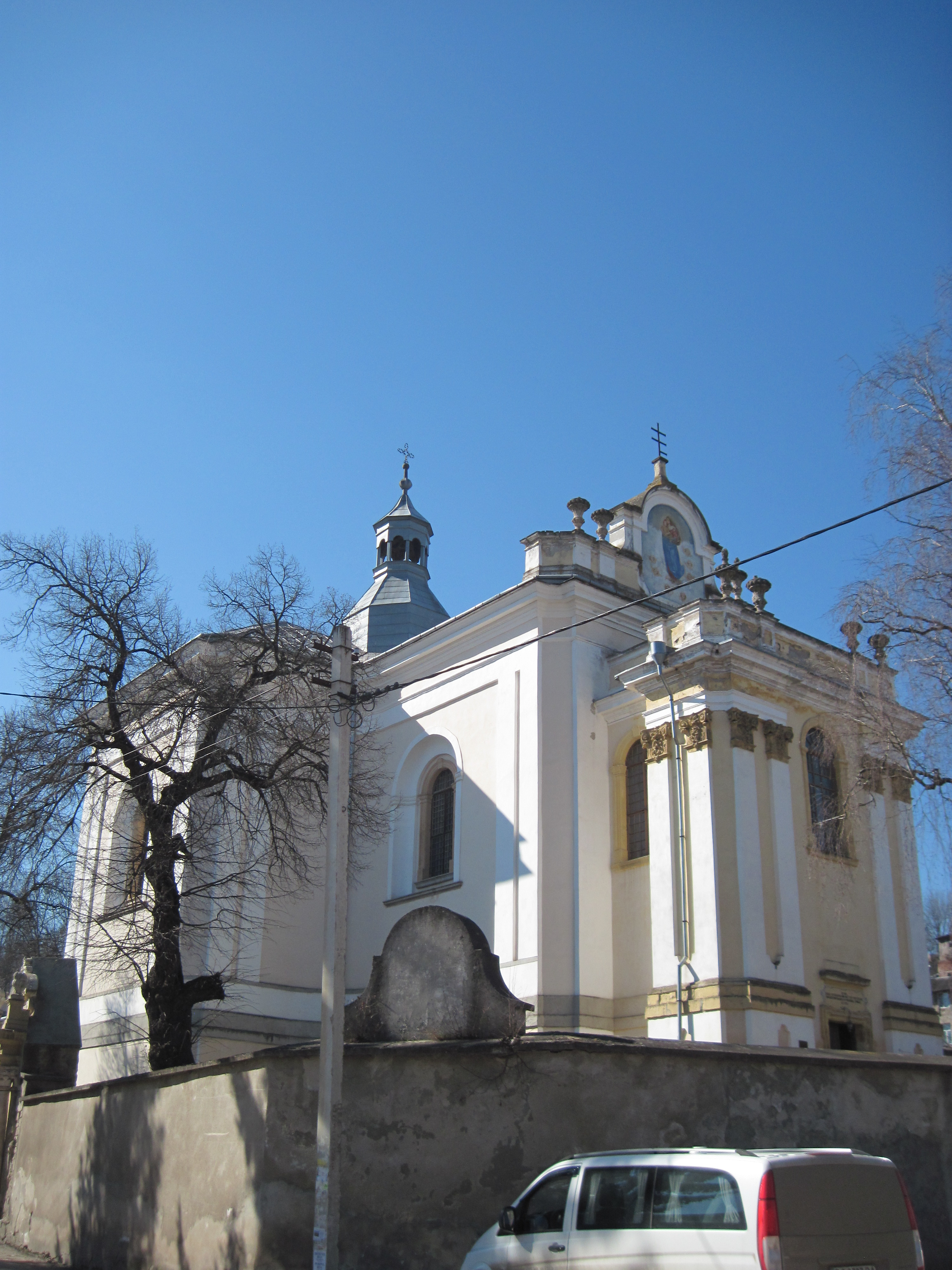 Бучач, костел Внебовзяття Пресвятої Діви Марії, 2015